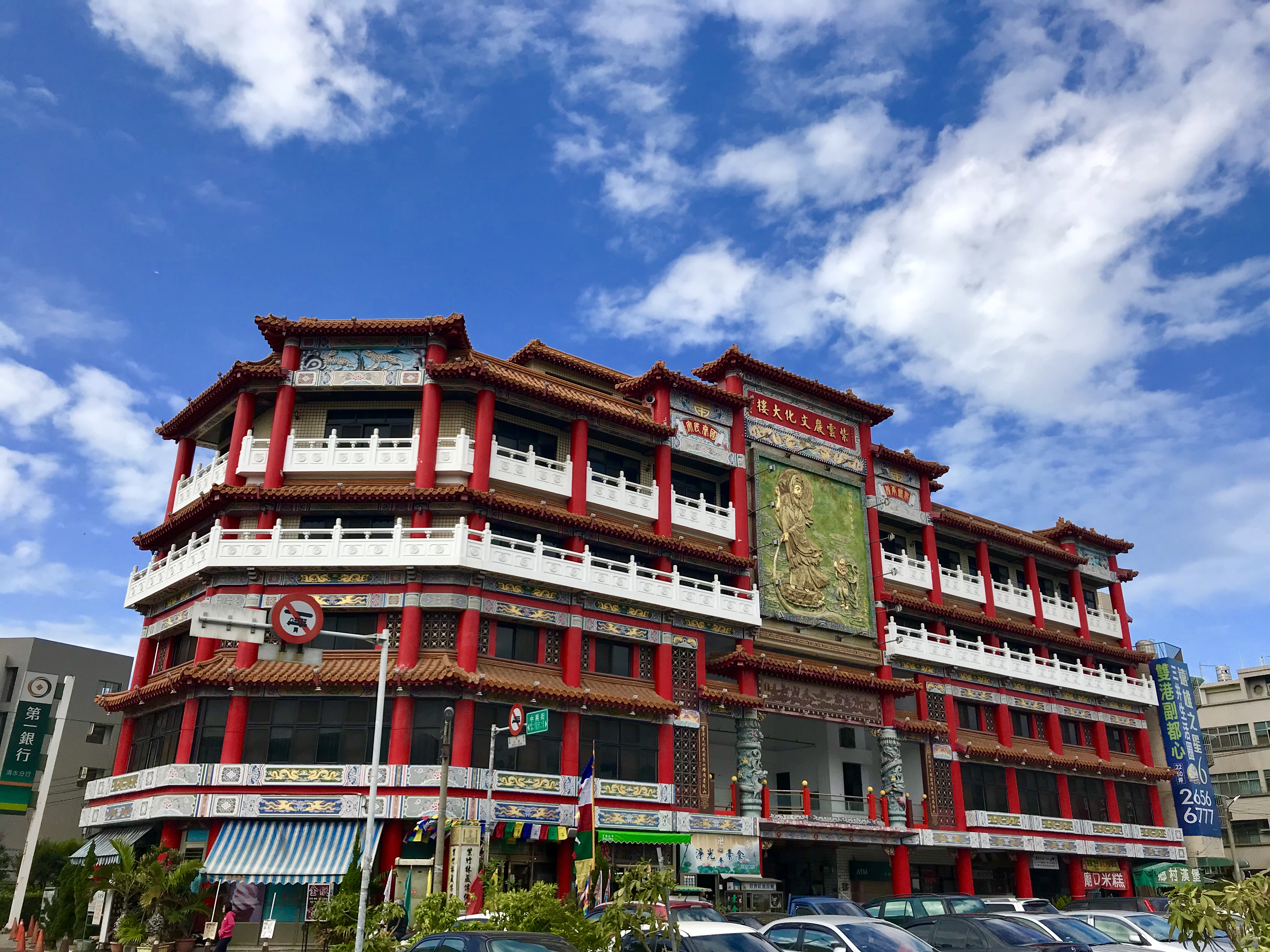 中文（台灣）: 清水紫雲巖香客大樓